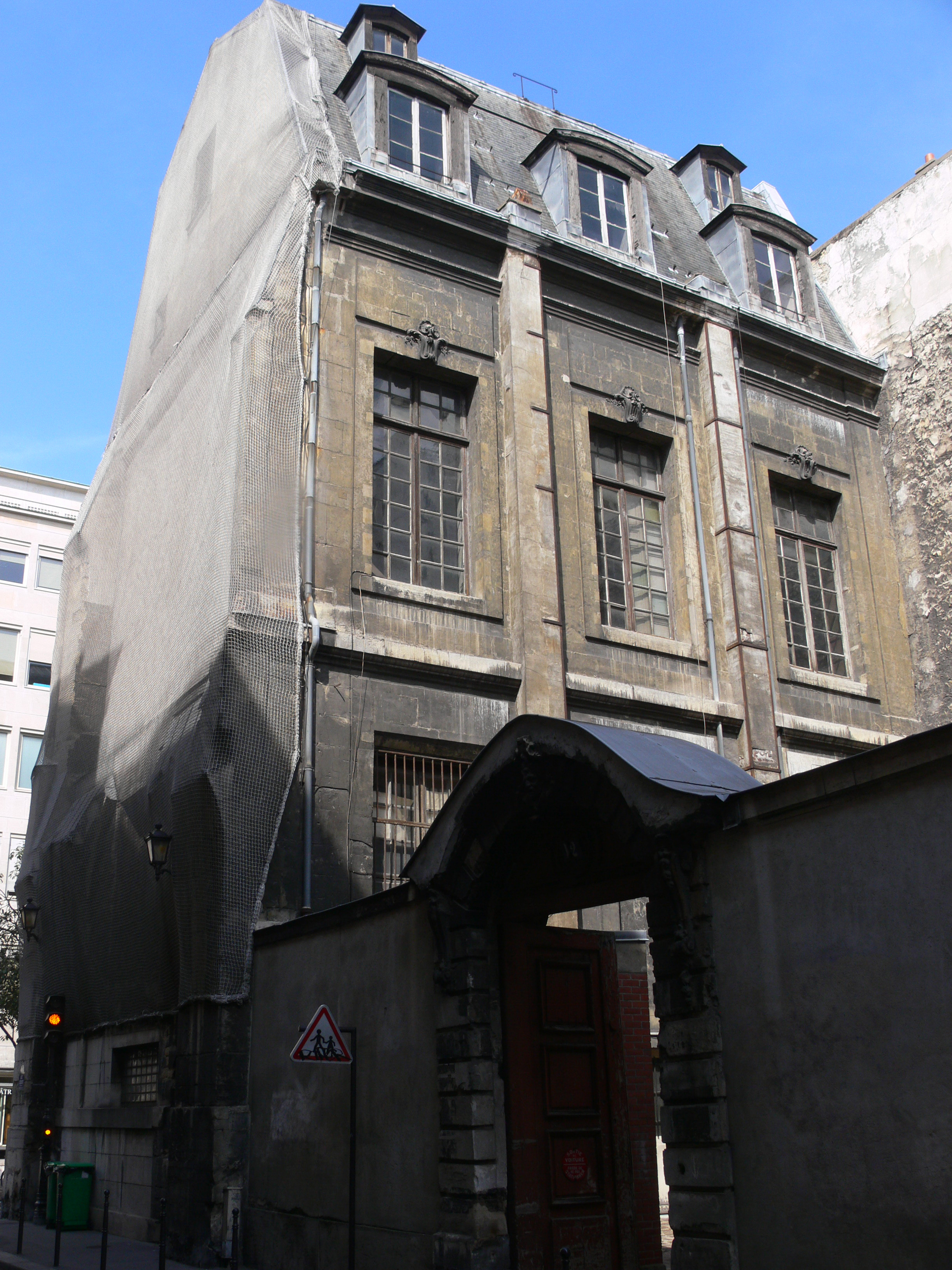 Hôtel de Nevers à Paris